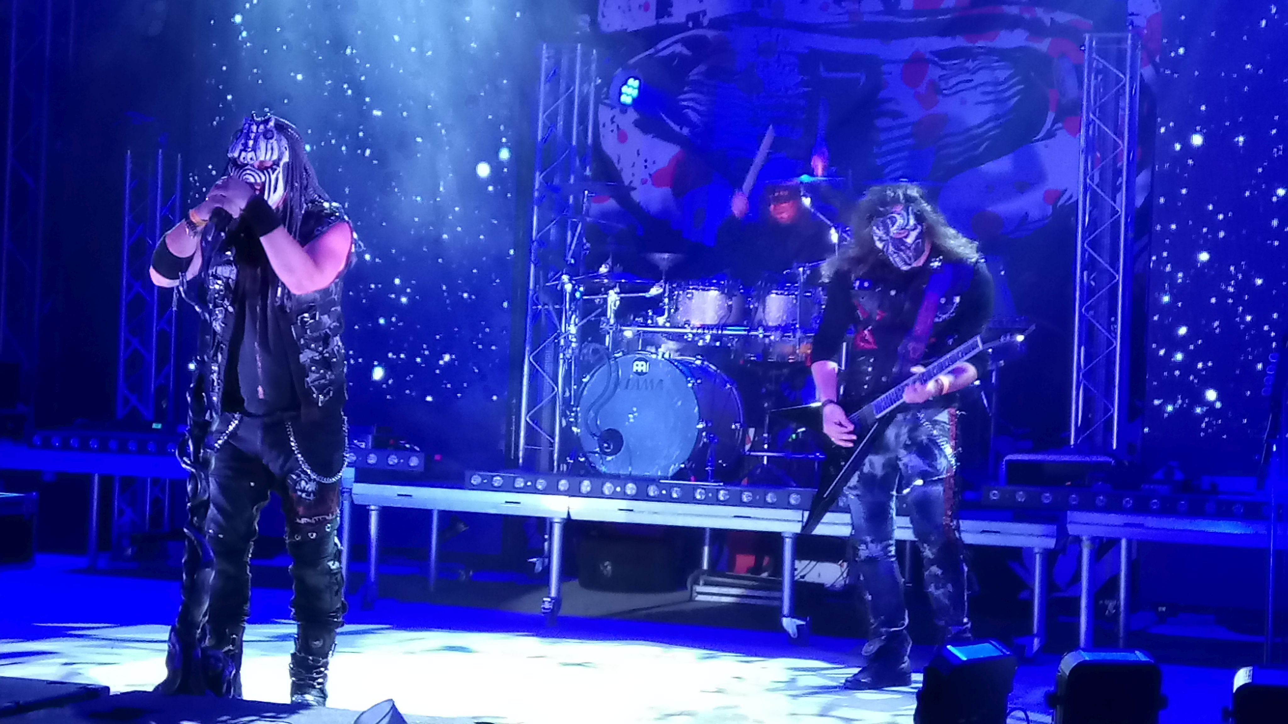 Dymytry na Mikulovském pivobraní při písni "Občas pocit mám"